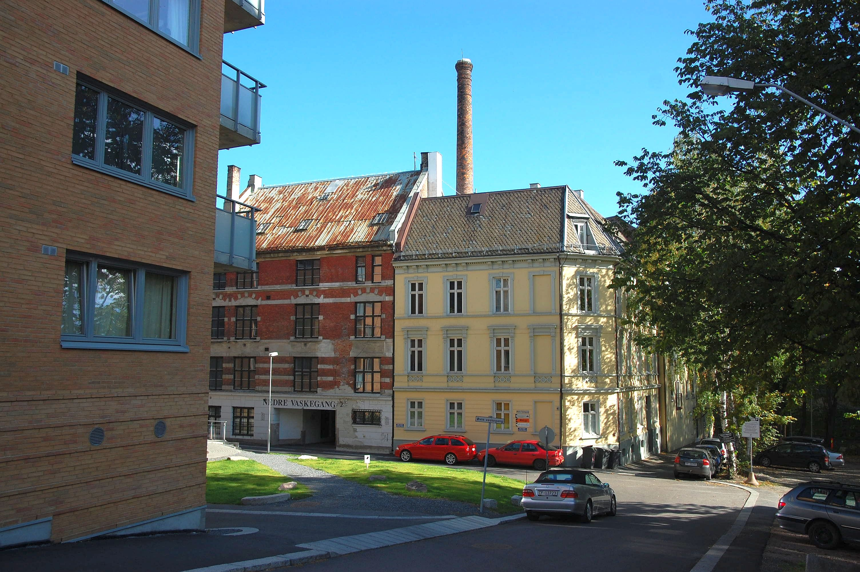 Nedre Vaskegang, på det gamle Fjerdingen, i bydel Grünerløkka, Oslo